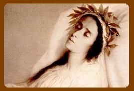 Portrait imaginaire de la comédienne Rachel par Frédérique O'Connell